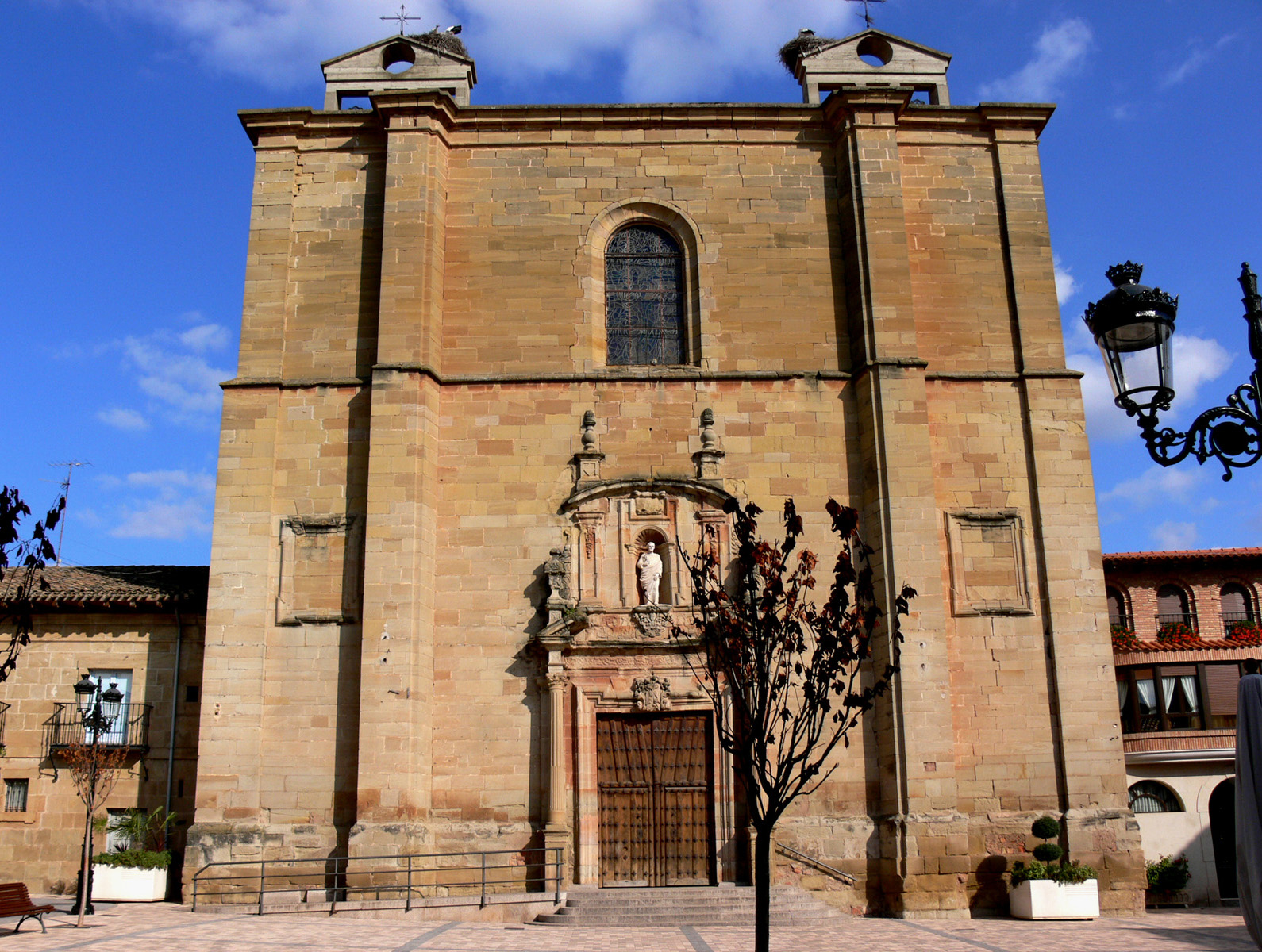 Iglesia de San Pedro en Huércanos, La Rioja - España.